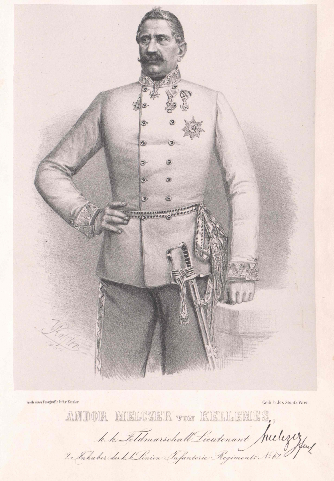 Báró Melczer Andor